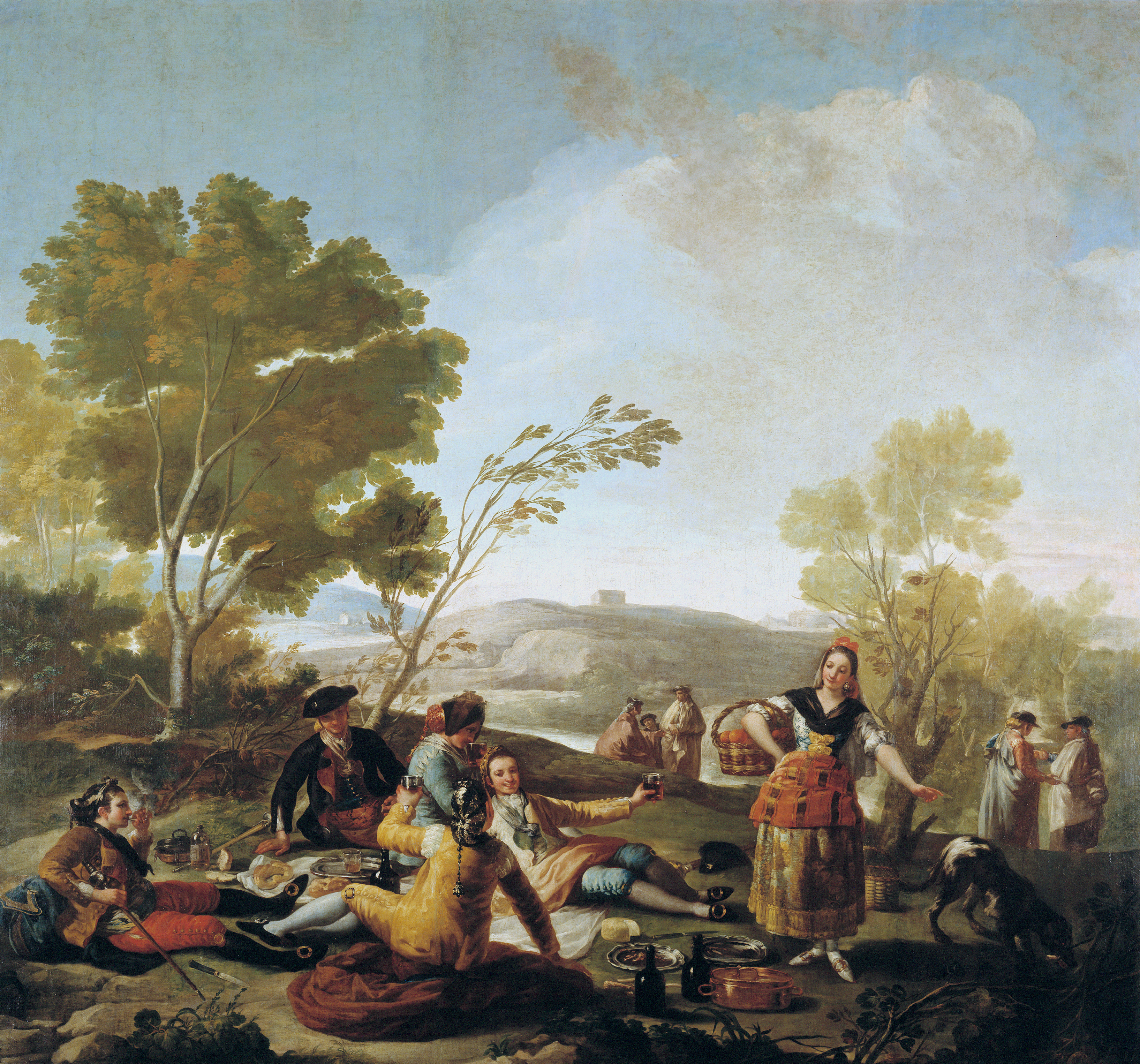 Merienda campestre